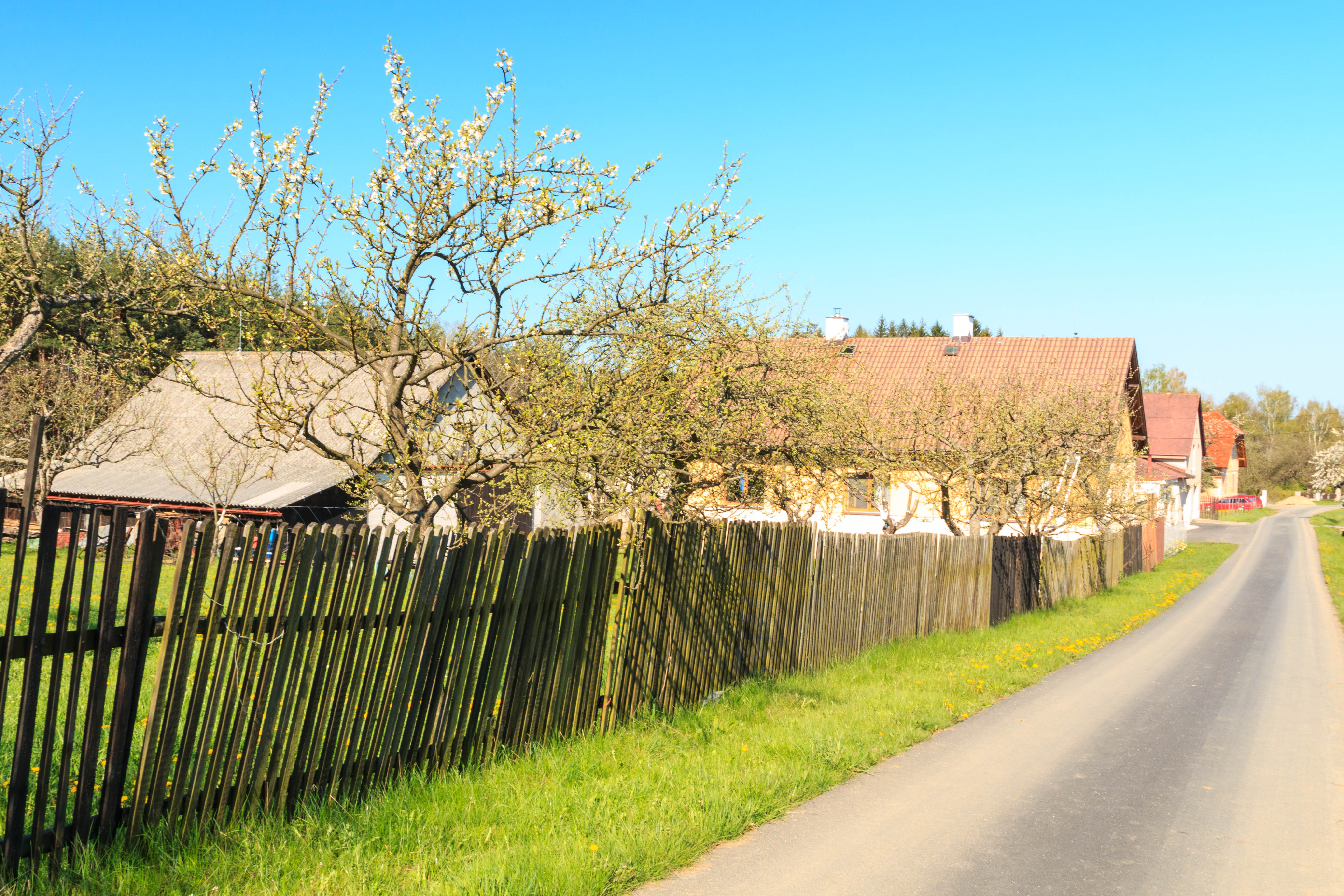 Pláňavy čp. 3